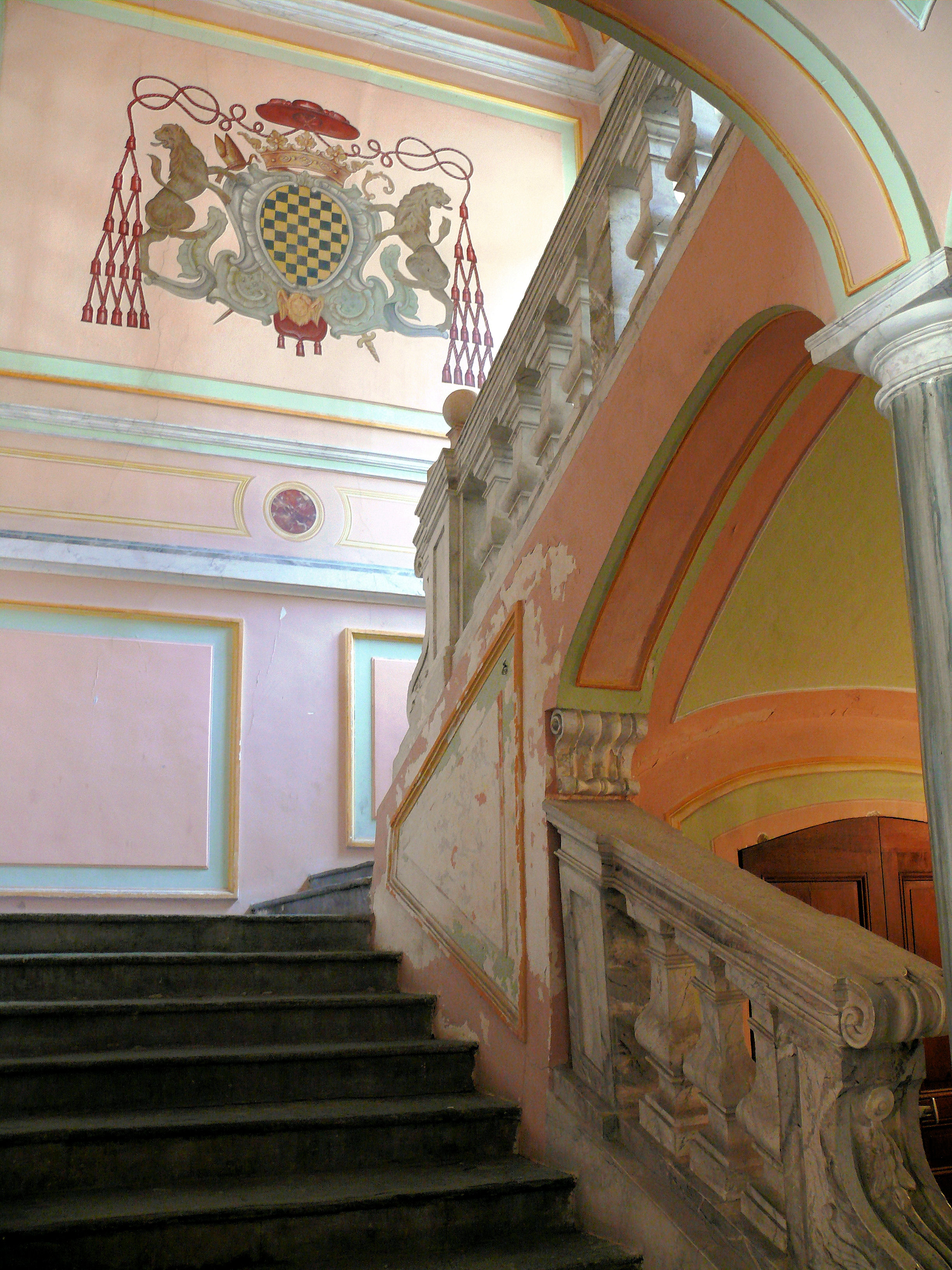 Saint-Jean-de-Maurienne - Ancien évêché - Escalier